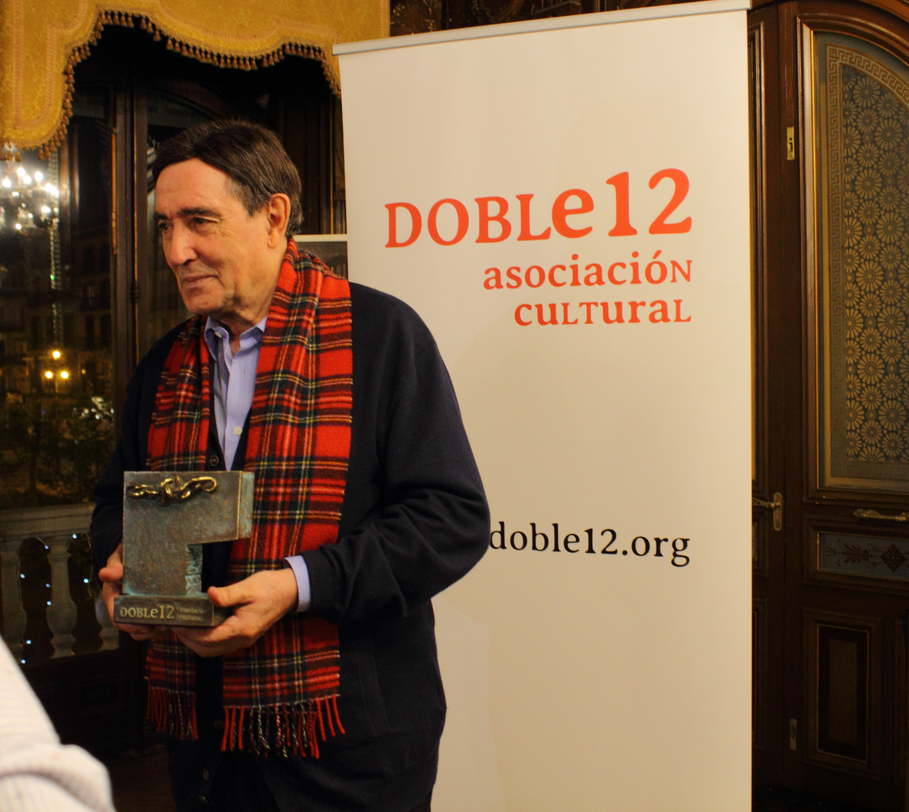 Victor Manuel Arbeloa (2016)